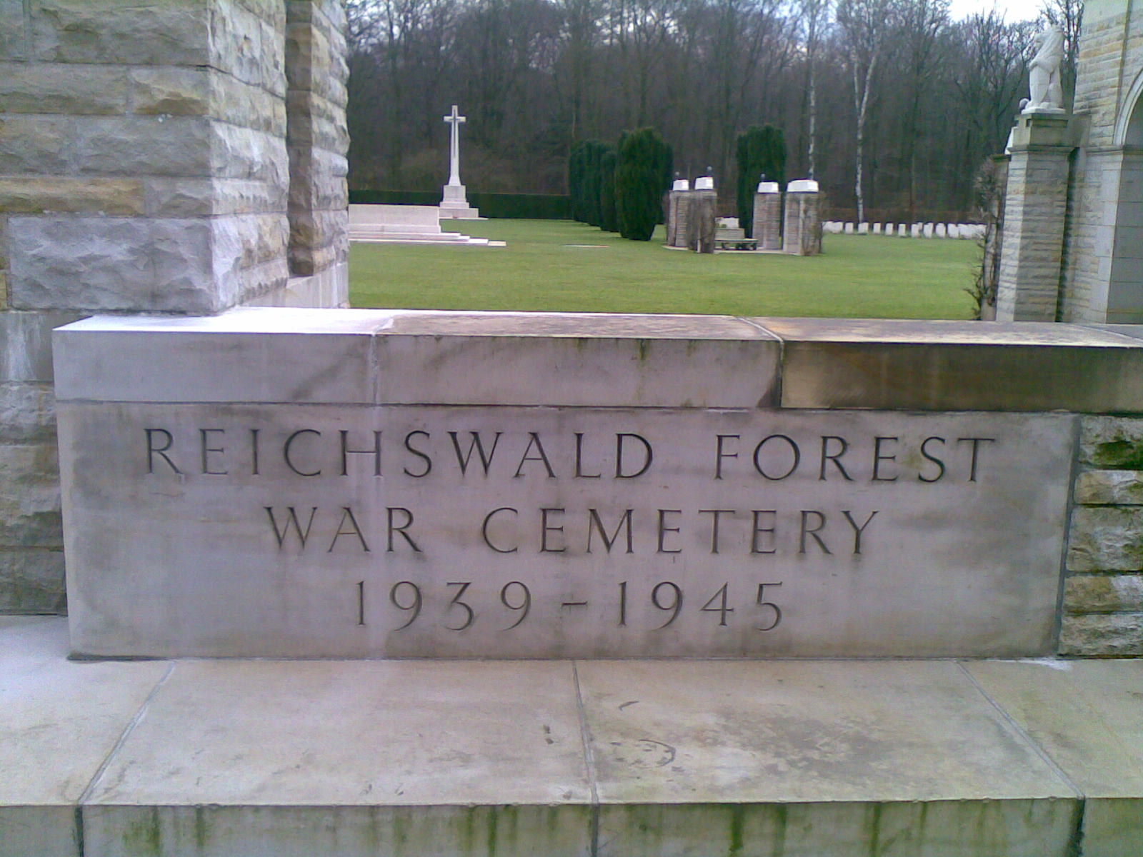 Gedenkstein, Eingang zum Britischen Ehrenfriedhof Reichswald